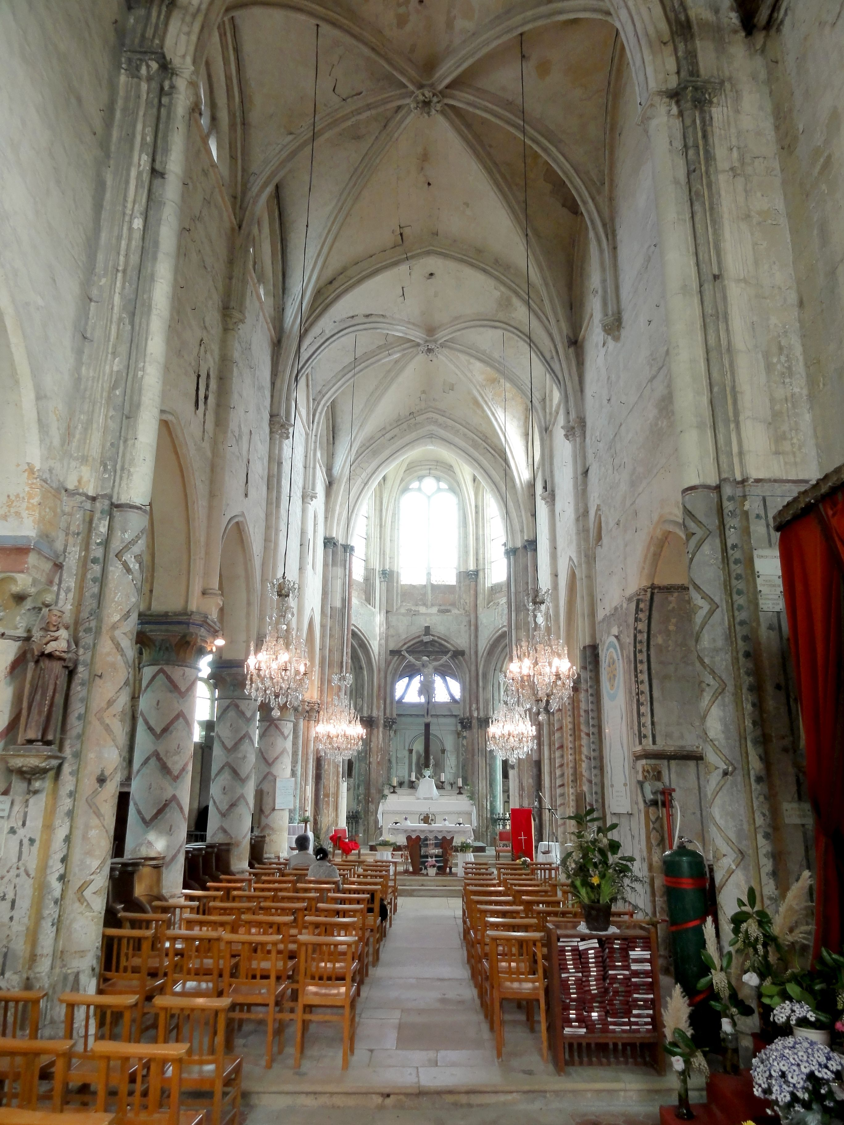 Intérieur, vue vers le chœur.